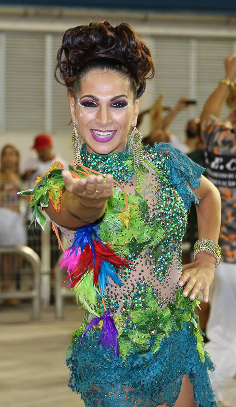 Aline Oliveira